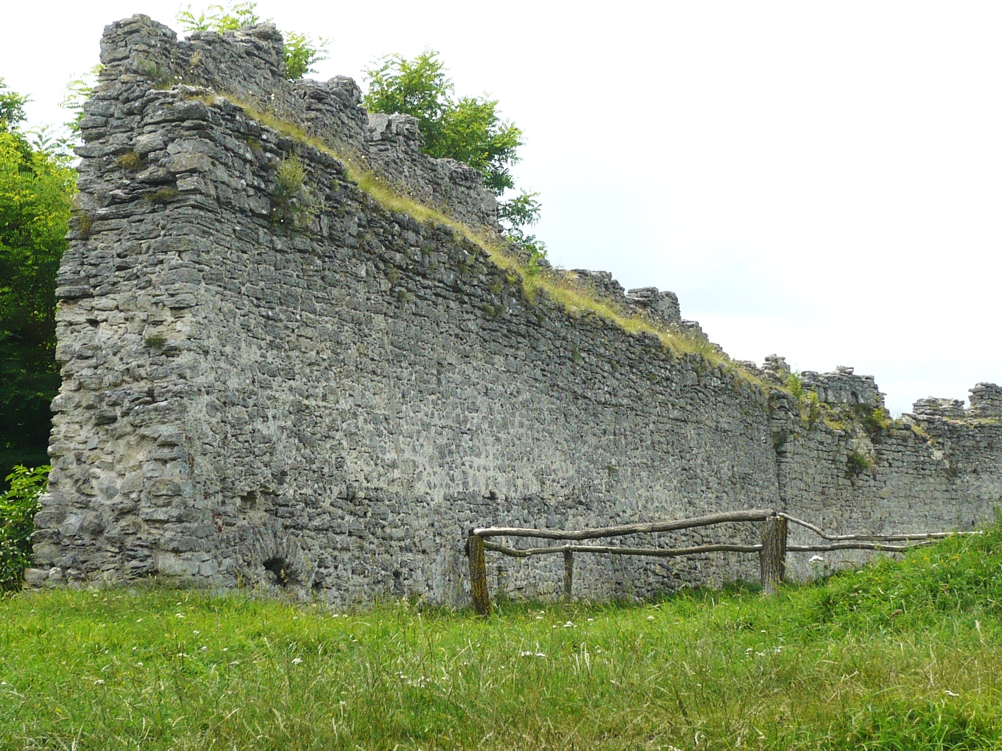 Zamek w Krzemieńcu